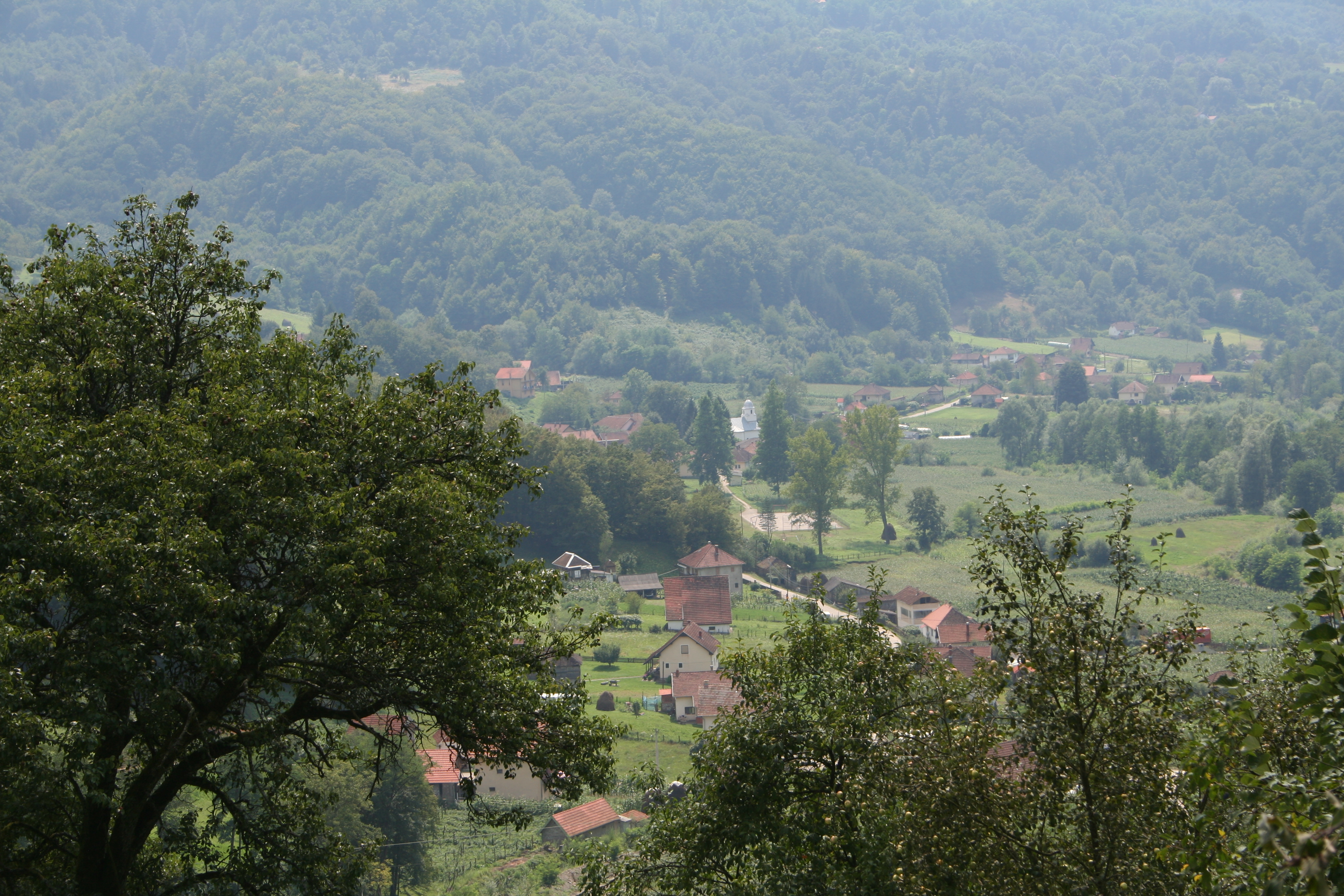 Panorama, Donja Trešnjica